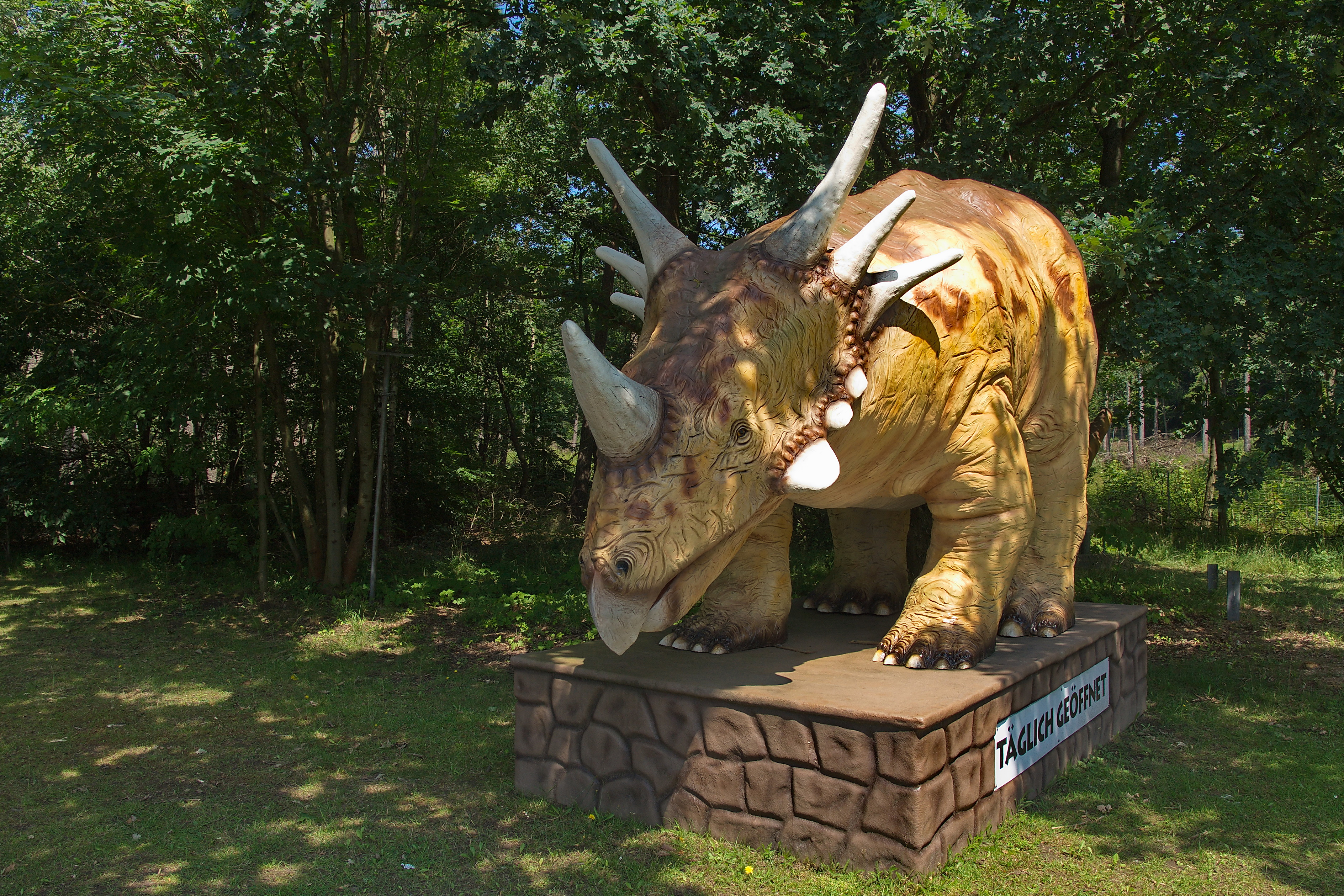 Dinosauriermodell an der Hauptstraße in Münchehagen (Rehburg-Loccum), Niedersachsen, Deutschland